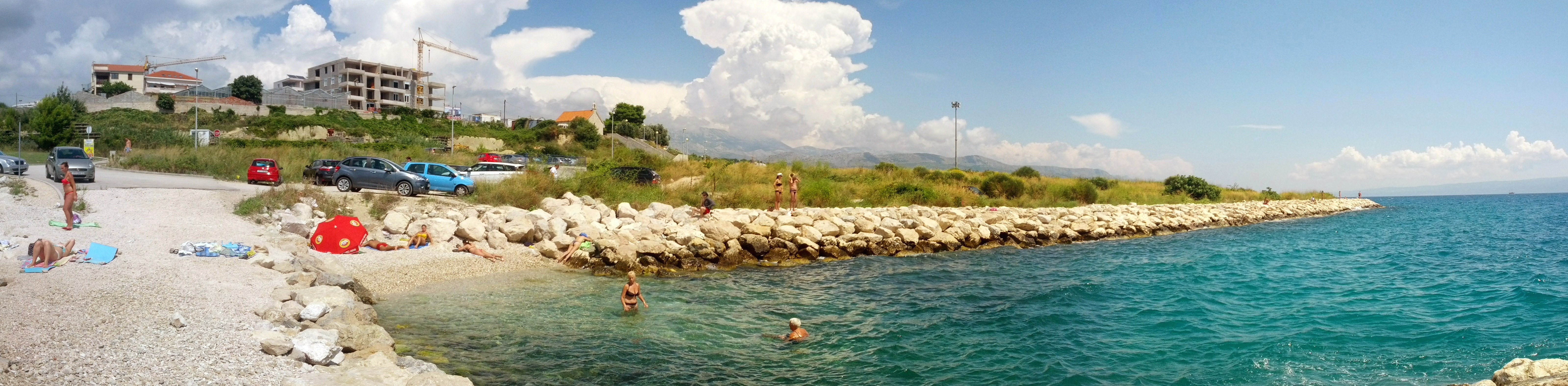 Plaża w dzielnicy Žnjan, Split, Chorwacja